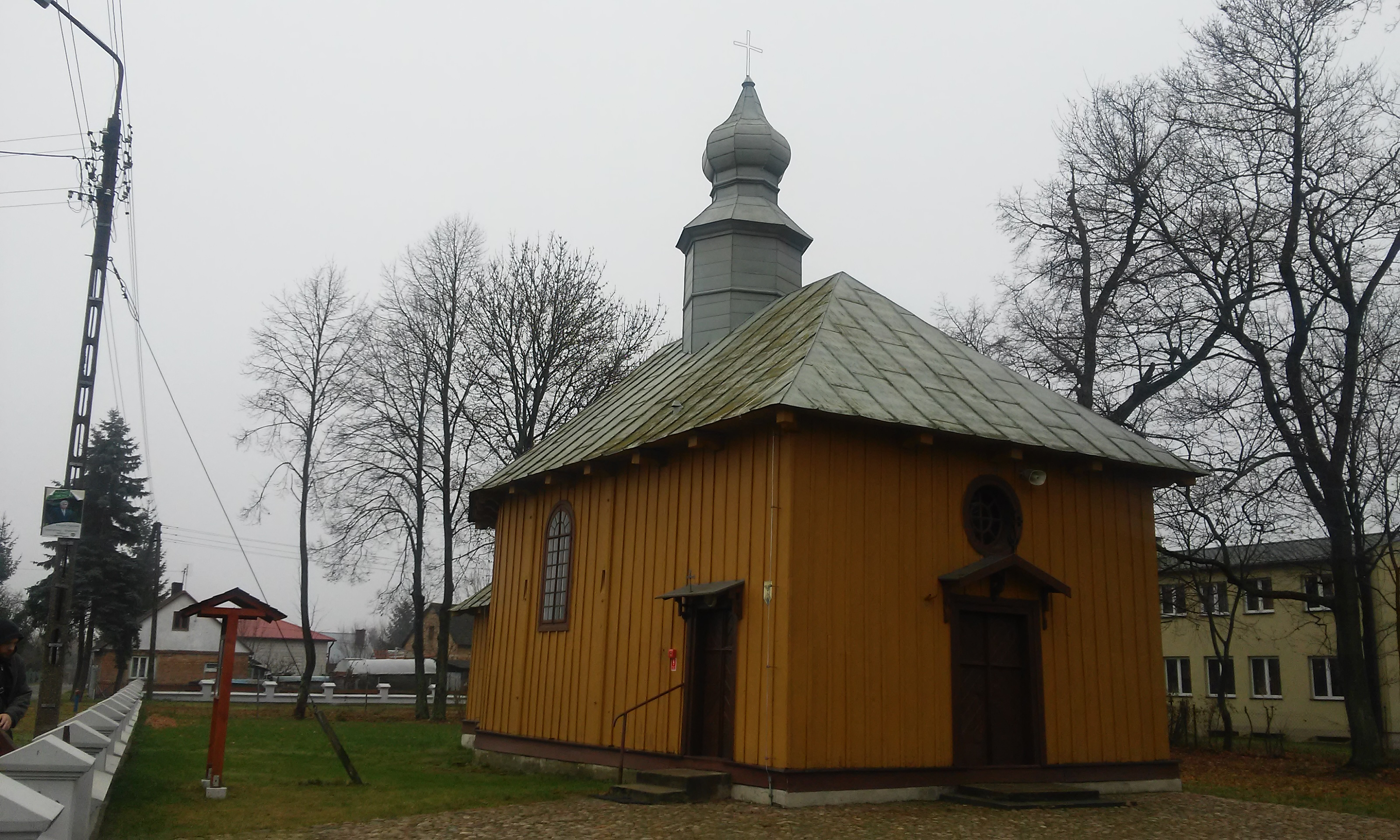 Dawna cerkiew, obecnie kościół w Ciciborze Dużym